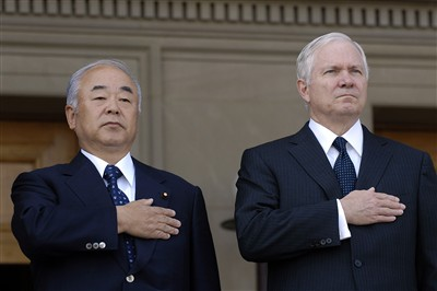 Fumio Kyuma and Robert Gates.